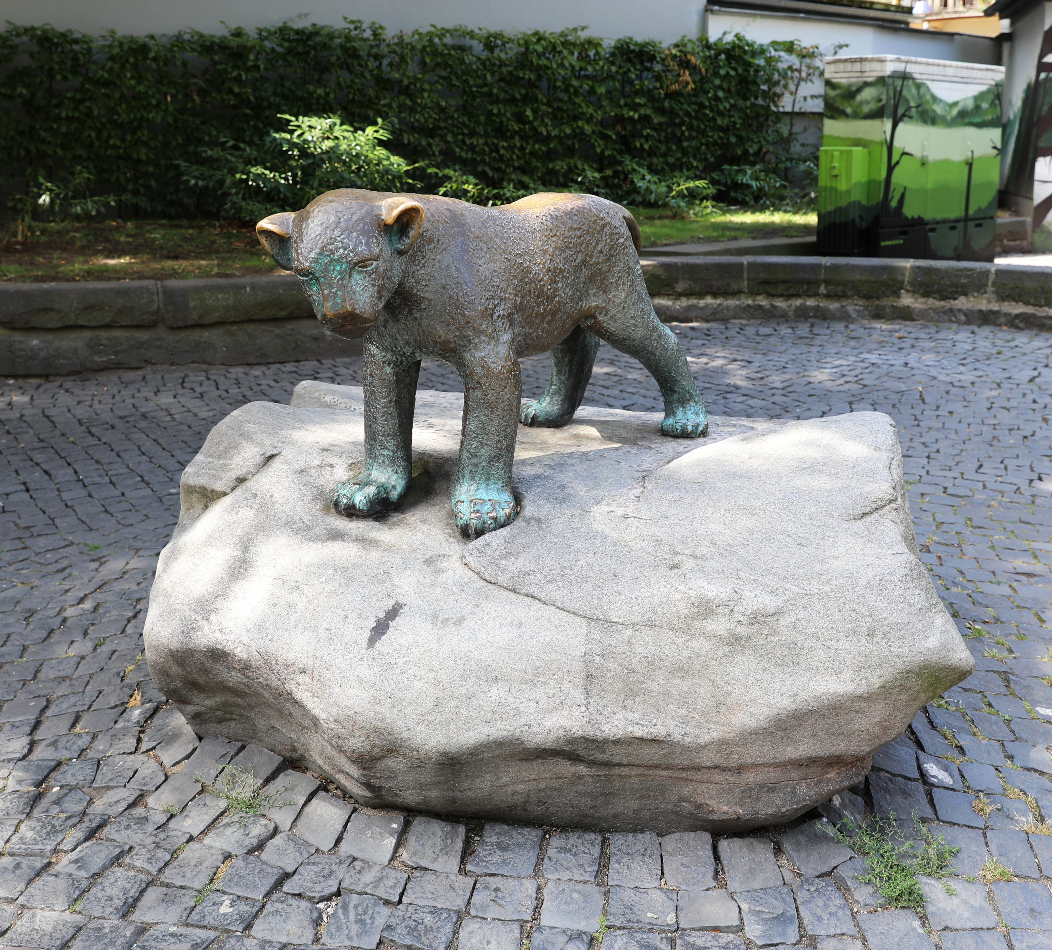 Bronzelöwe von Lies Ketterer am Fronhof in Solingen. Findling bearbeitet Egon Ernst Oslender